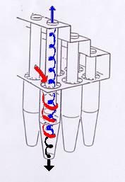 Schémas de principe d'un multi-Cyclone